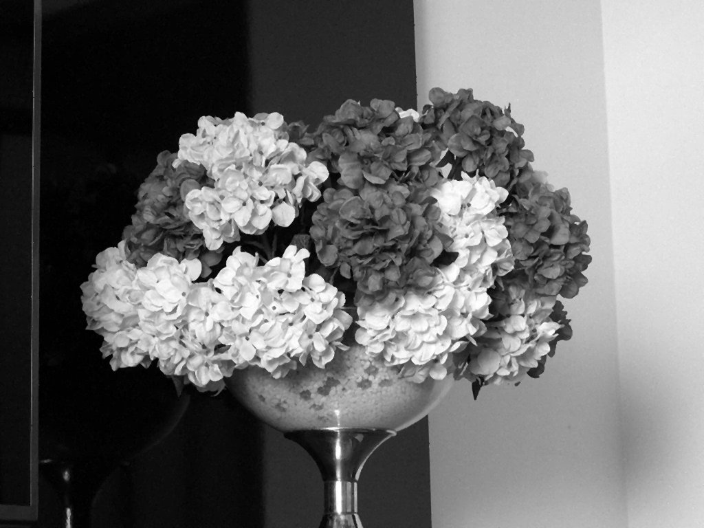 Tamanho da mascará - 1px